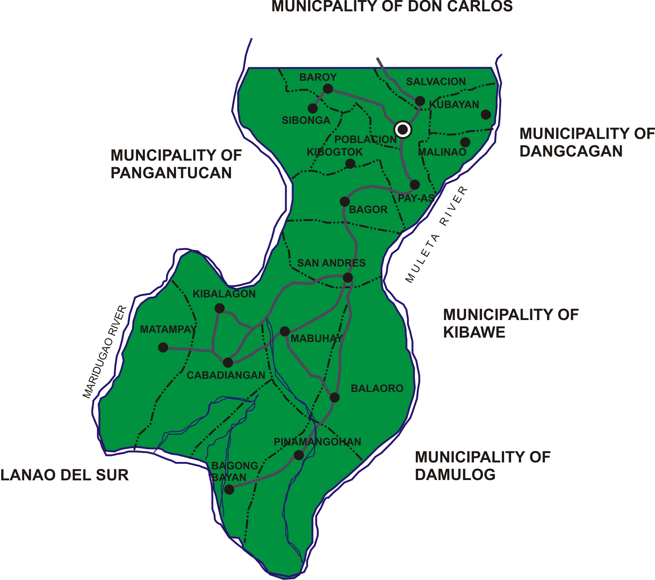 Political map of Kadingilan, Bukidnon